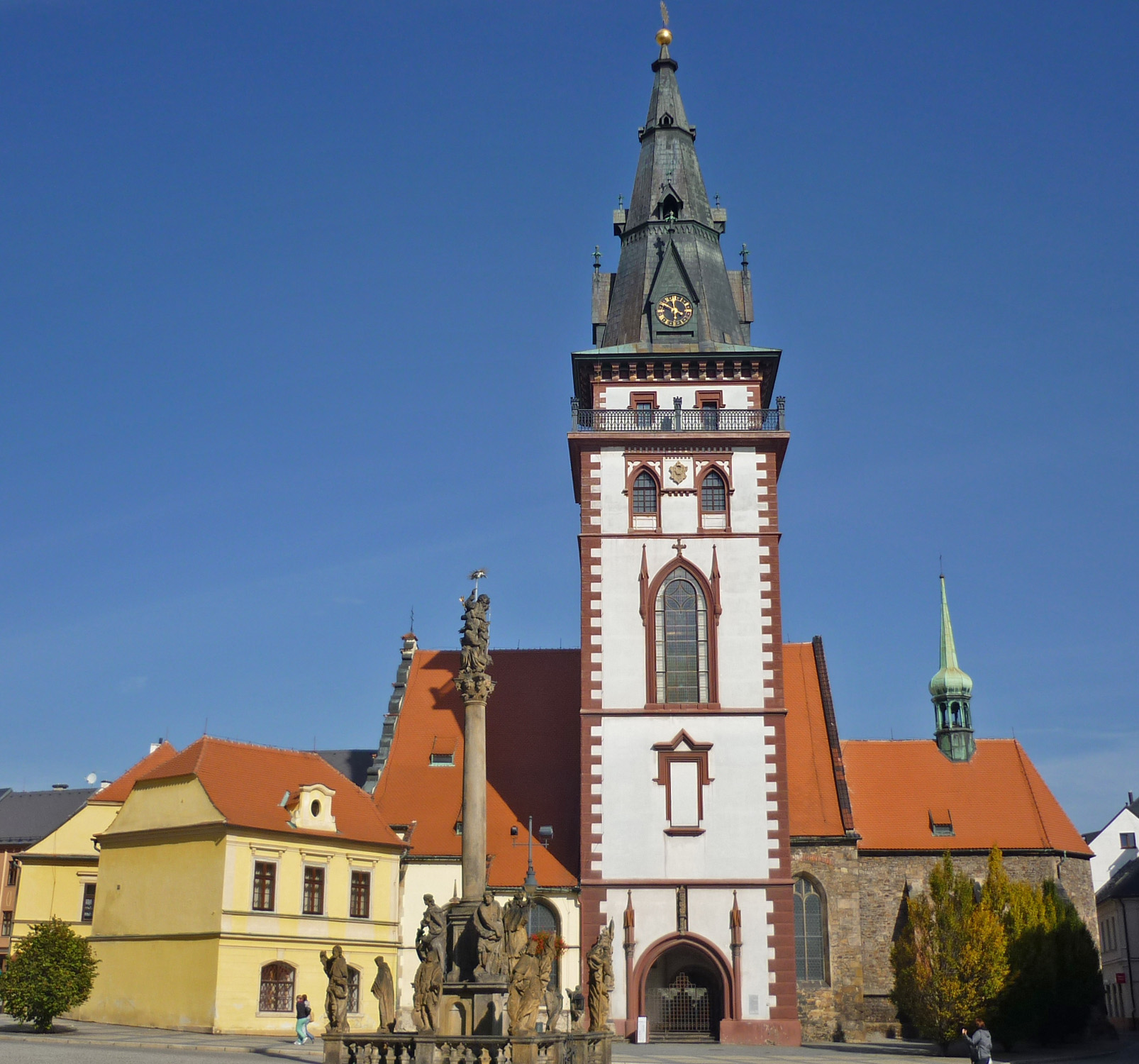 Stadtpfarrkirche Mariä Himmelfahrt und Stadtturm in Komotau (Chomutov)